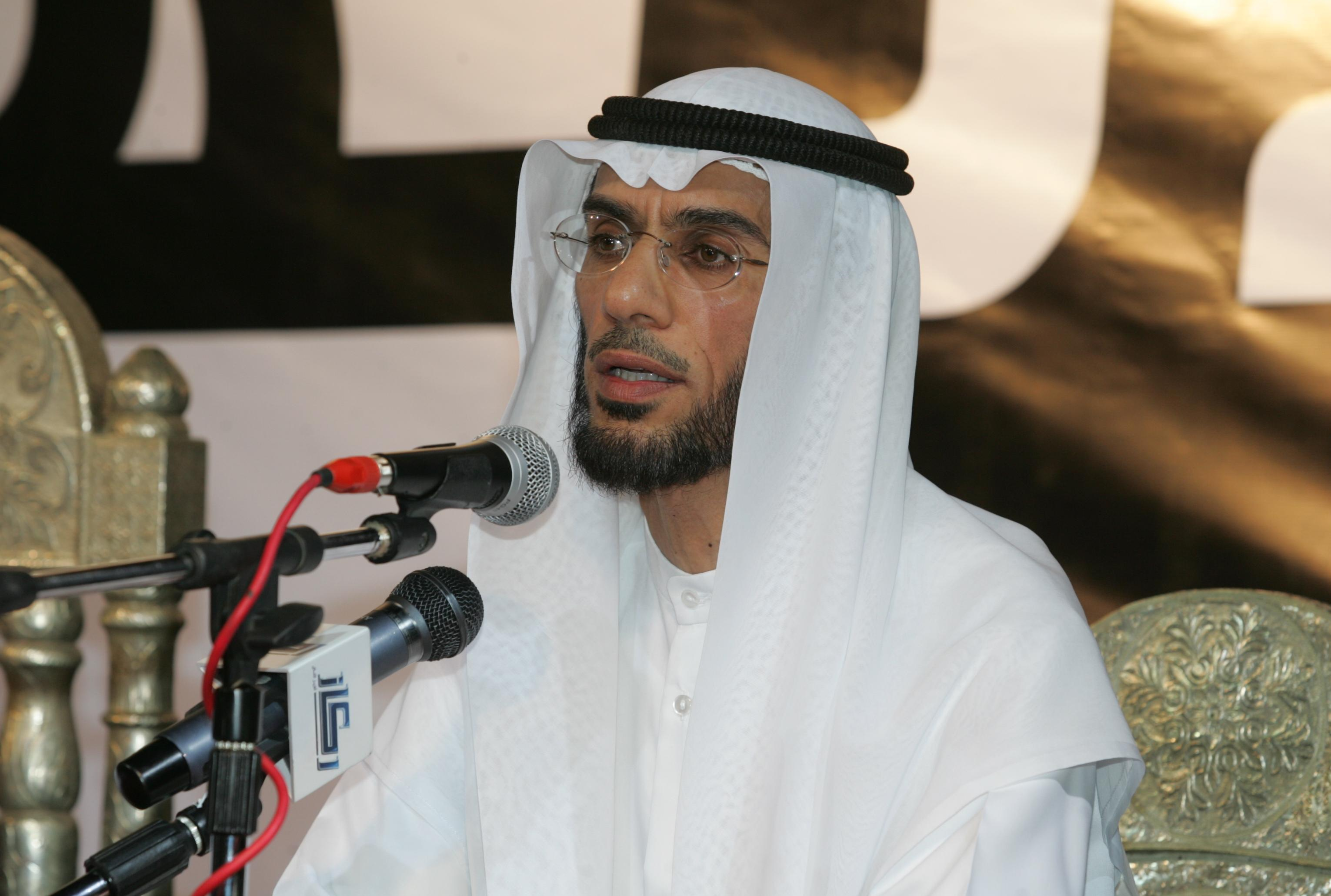 صور محاضرات للشيخ الدكتور محمد العريفي ألقاها في عدة أماكن في الكويت وكانت بتنظيم إدارة الثقافة الإسلامية والمحاضرات تمت في مسجد الحضيري ومسجد القادسية ومسجد الصليبخات والفردوس وفي مجمع الكوت وفي المسجد الكبير وندوة في تلفزيون الكويت وفي جمعية الإصلاح الاجتماعي ومحاضرة في كلية التربية وجمعية إحياء التراث في قرطبة ومحاضرة في مسجد سبيكة وفي ثانوية العتيبي منطقة الخالدية وفي مسجد مجاهد ( الرحاب) ومنطقة هدية وتميزت المحاضرات بإقبال جماهيري منقطعة النظير